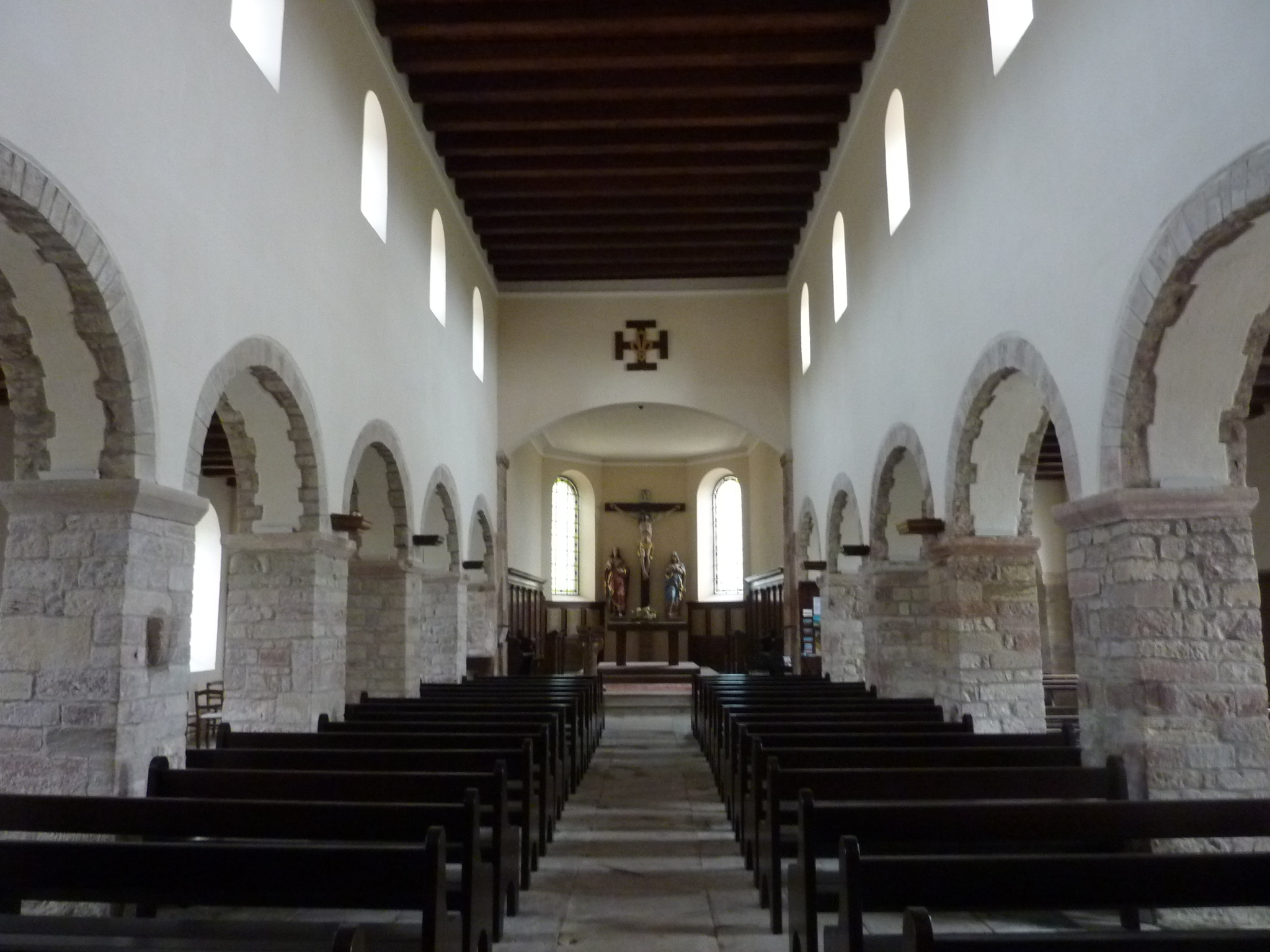 Dompeter, Avolsheim